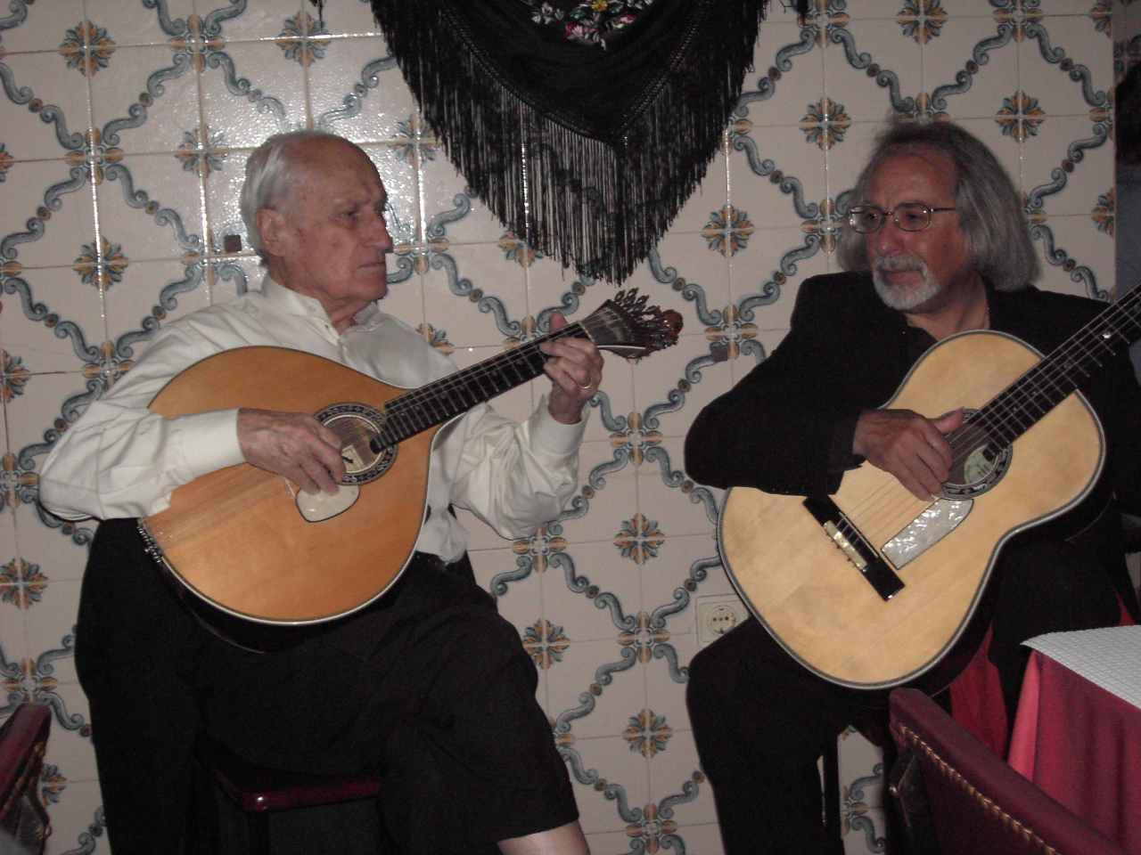 Lisboa, Adega do Ribatejo - le chitarre del fado